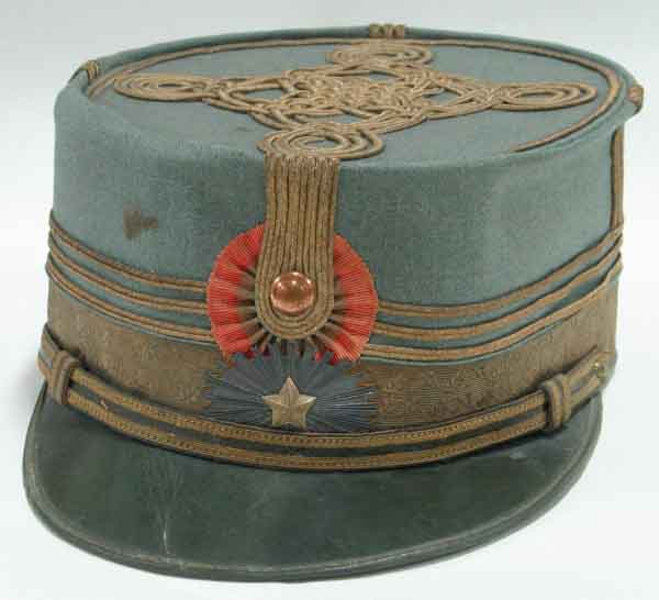 Chipiu de general de corp de armată. A aparţinut lui Eremia Grigorescu, comandantul Armatei I-a române în timpul primului război mondial. Este din postav de culoare verde - cenuşiu, având pe galonul de general o broderie lată din fir canetil - aurit